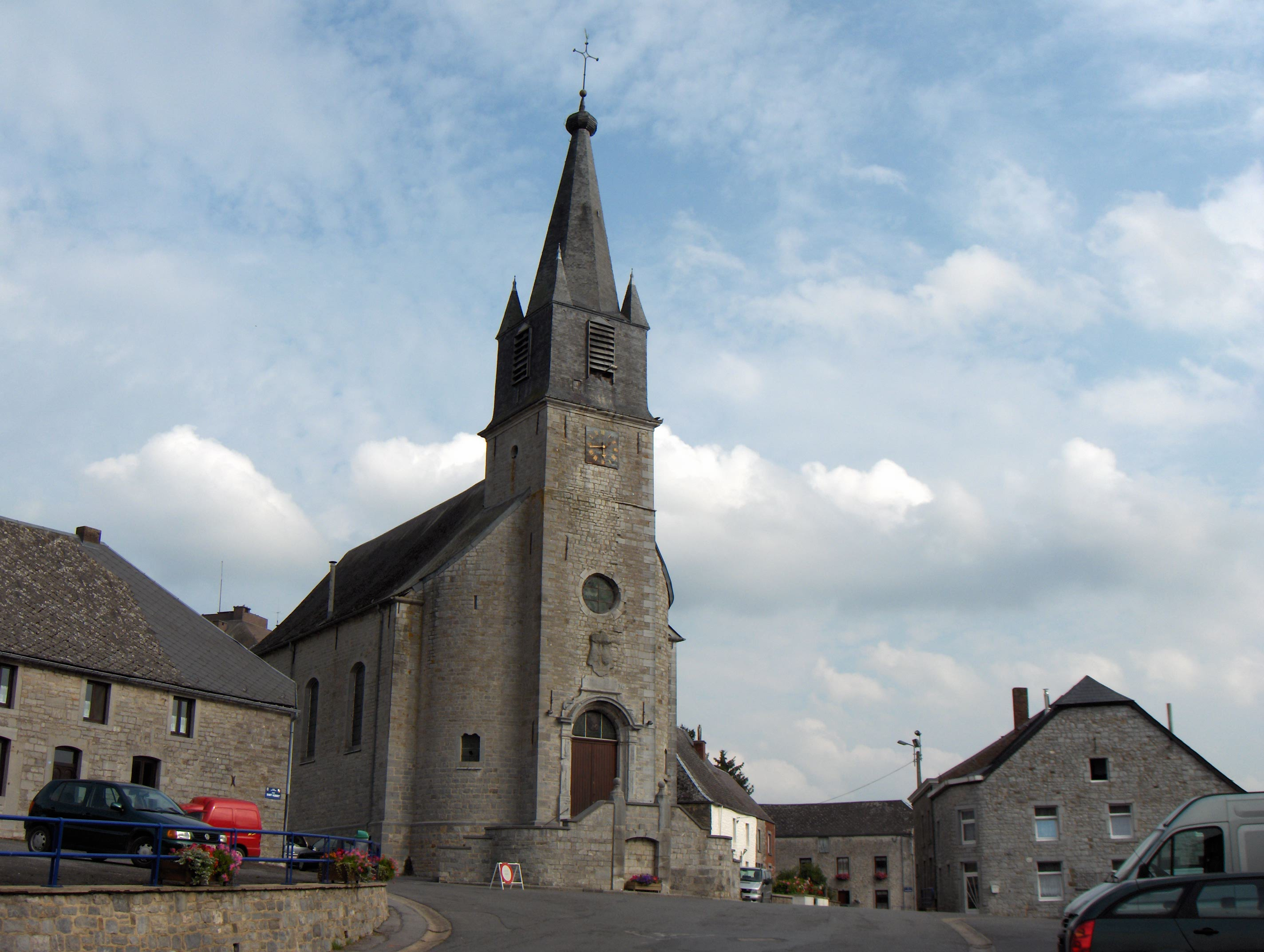 Pesche (Ortsteil der Gemeinde Couvin, Prov. Namur, Belgien)